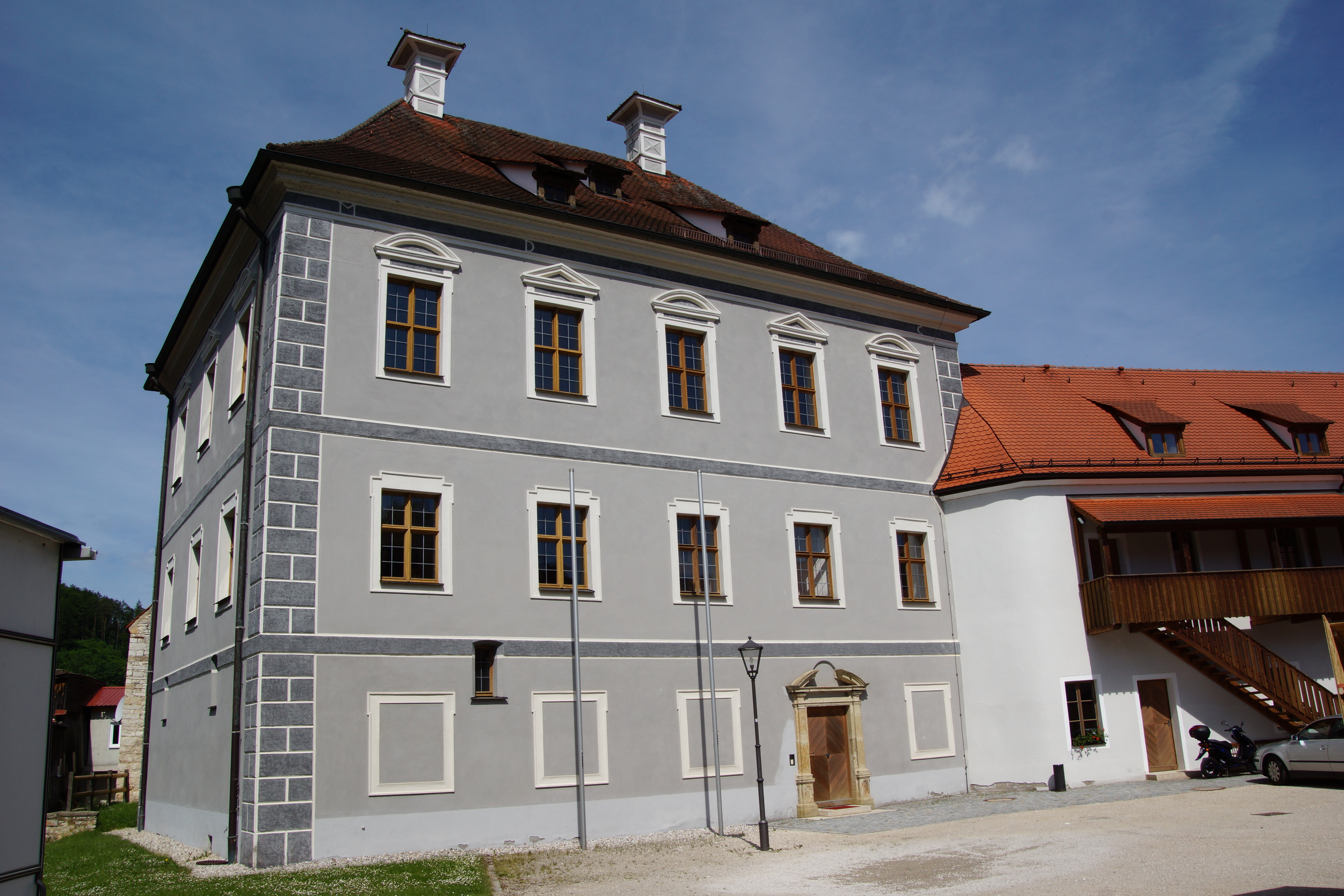 Das Hammerschloss oder auch Untere Schloss im Oberpfälzischen Markt Schmidmühlen